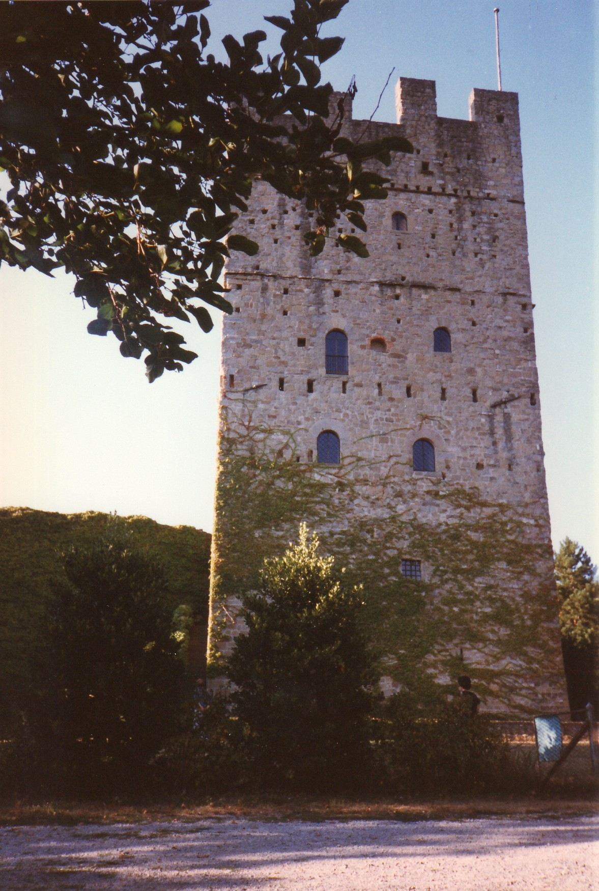 Castello di Porciano, Stia, AR, Italy